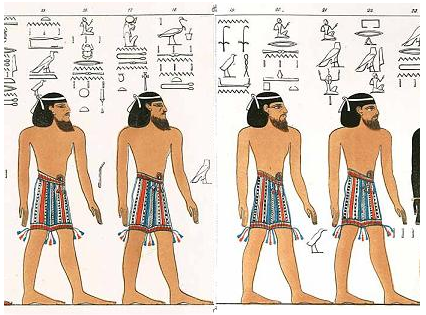 תיאור של כנענים (מכונים גם "שמיים" או "אסיאתים" באנגלית), כפי שתוארו ב"ספר השערים", טקסט דתי ממצרים העתיקה מן המאה ה-13 לפנה"ס. Description of Asiatics ("Aamu") as they were portrayted in the Ancient Egyptian "Book of Gates", dated to the 13th Century BCE.